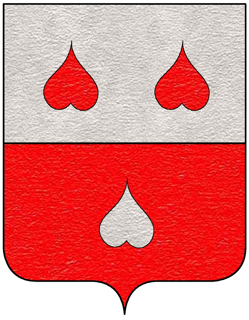 Stemma della famiglia Colleoni